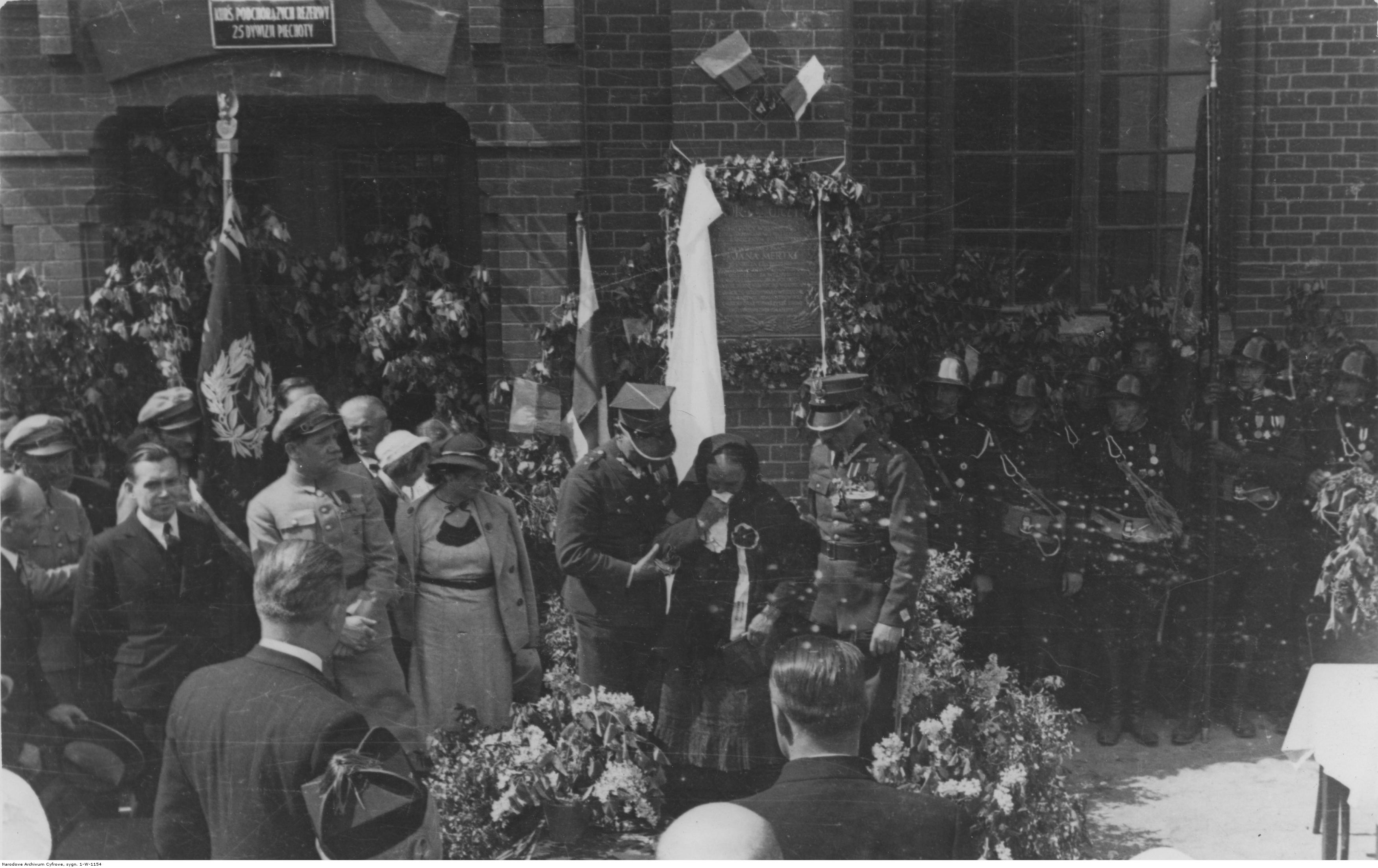 Wmurowanie tablicy ku czci Jana Metryki w siedzibie kursu podchorążych rezerwy 25 Dywizji Piechoty w Szczypiornie - fragment uroczystości. Koncern Ilustrowany Kurier Codzienny - Archiwum Ilustracji. Sygnatura: 1-W-1154